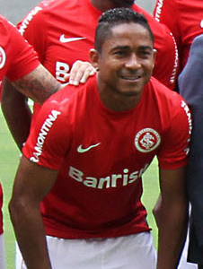 Visita da presidente Dilma Rousseff ao Beira-Rio (20 de fevereiro de 2014